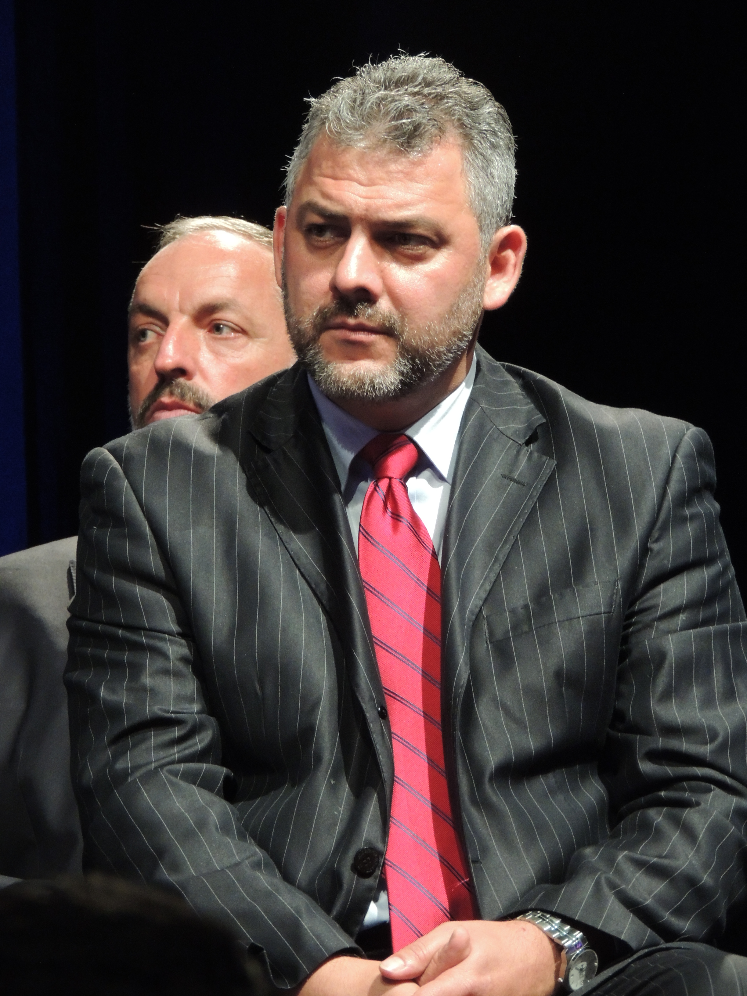 Carlos Segnini, Ministro del Ministerio de Obras Públicas y Transportes de Costa Rica 2014-2018